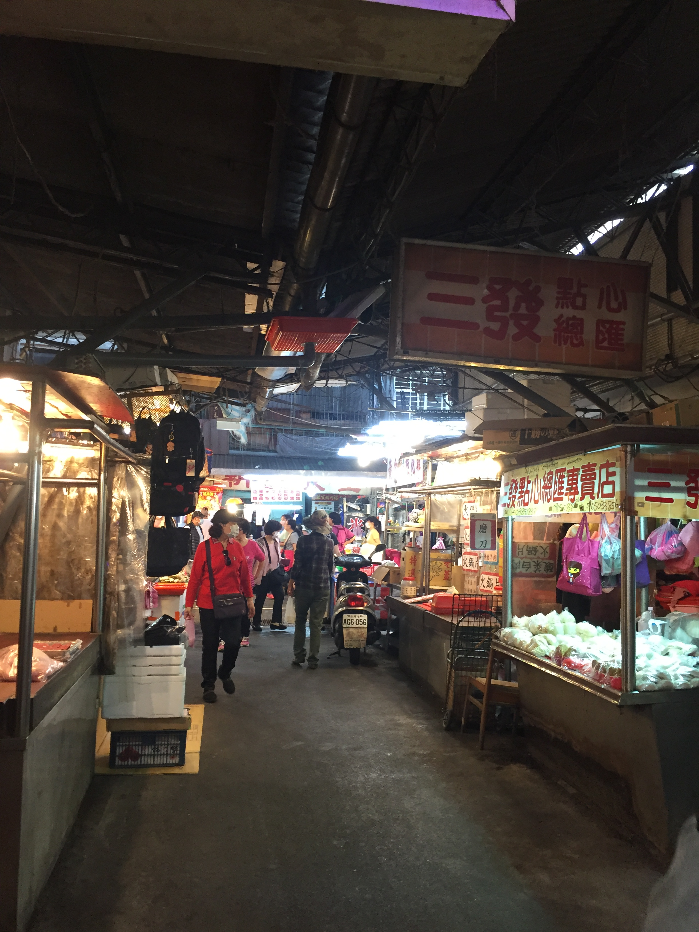 中文（台灣）: 台灣台北市士林區華榮街內華榮市場中